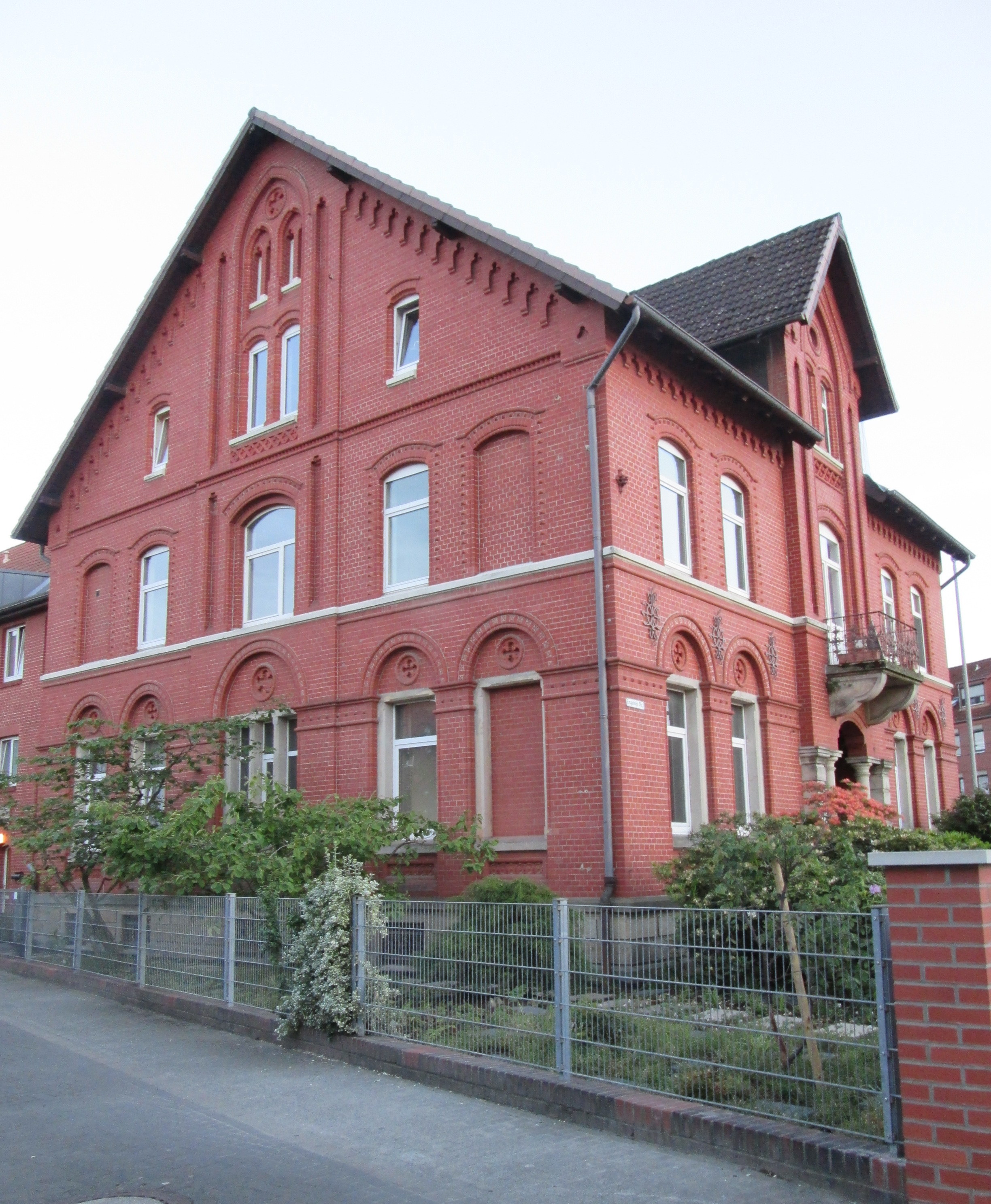 Gründerzeithaus - Hannover-Badenstedt, Empelder Straße 1